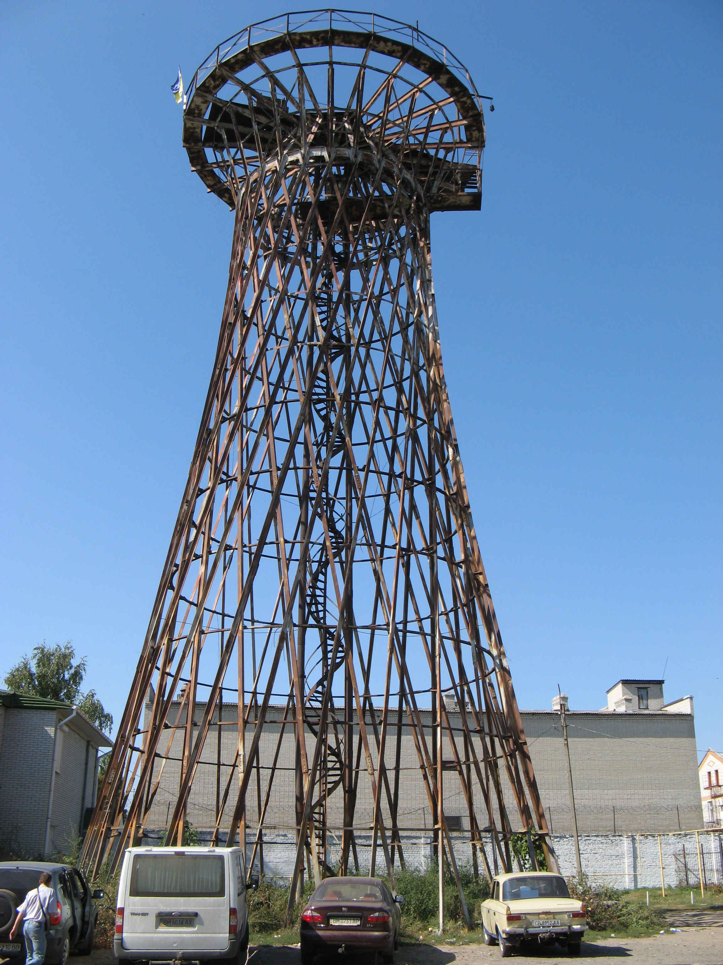 Шуховська вежа (Конотоп)